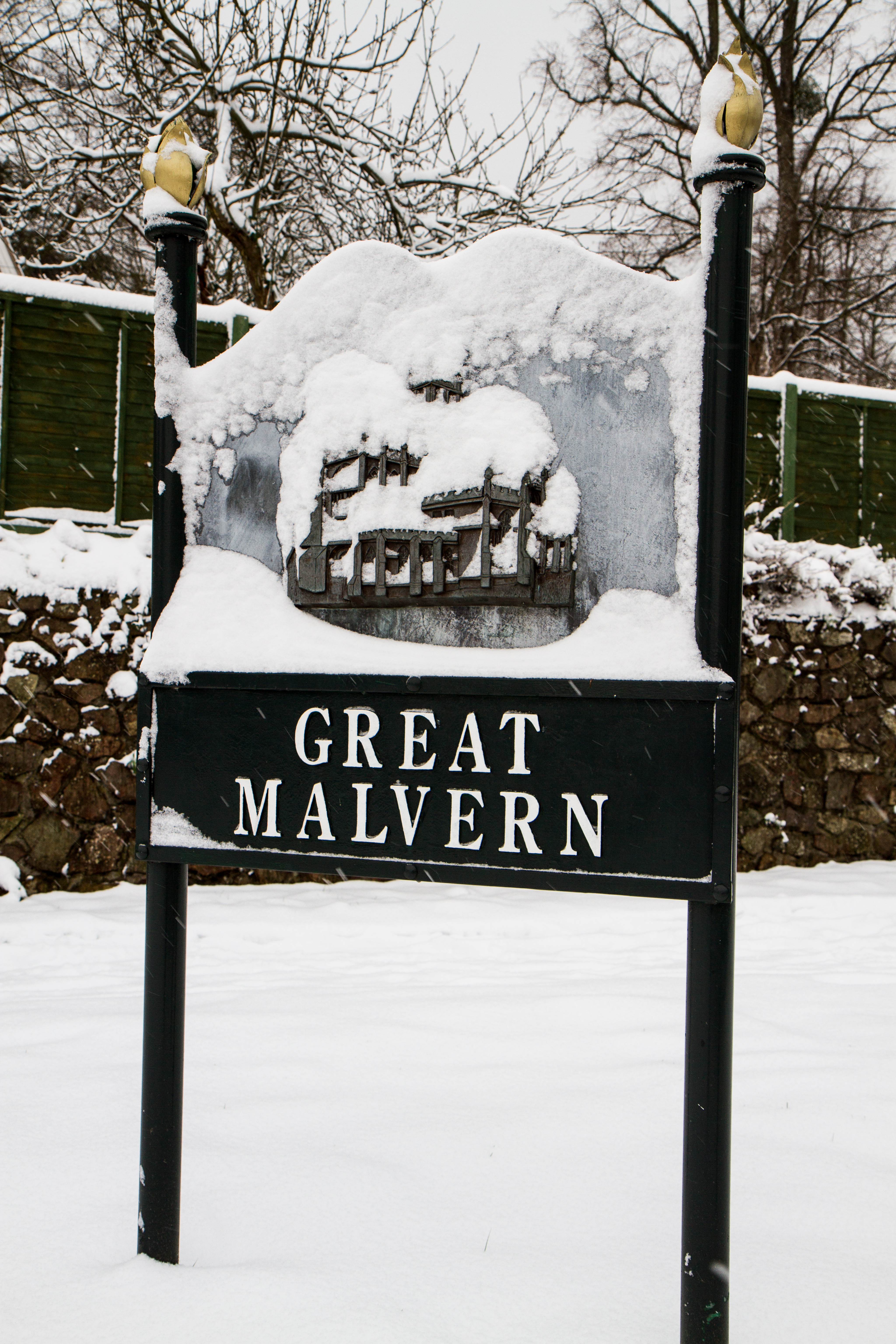 Great Malvern - tablica przy wjeździe